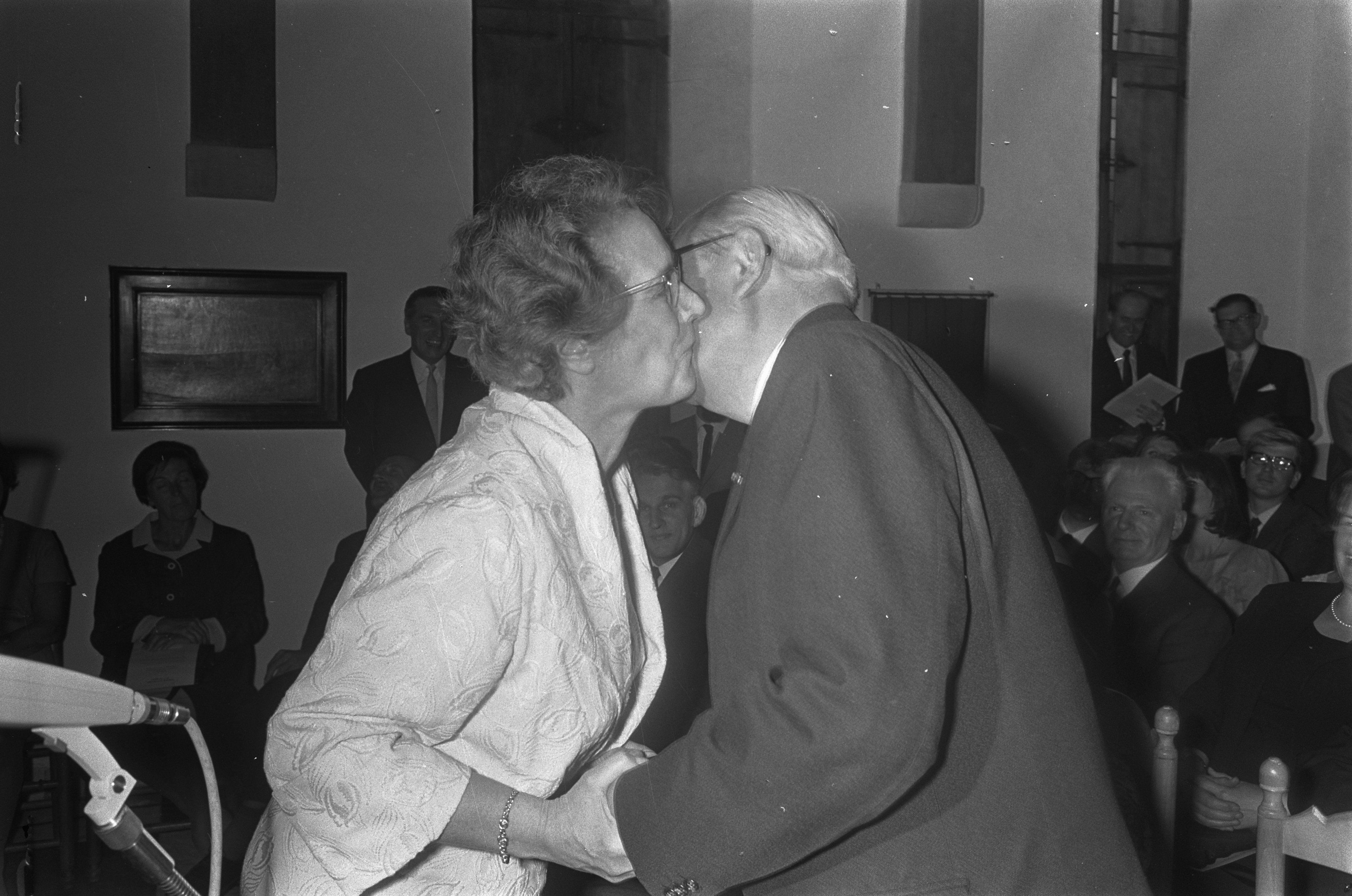 P.C. Hooftprijs voor Anton van Duinkerken, 4 juli 1967. Na overhandiging in het Muiderslot kreeg Van Duinkerken een zoen van minister Marga Klompé. (Anton van Duinkerken is het pseudoniem van Wilhelmus Johannes Maria Antonius Asselbergs)